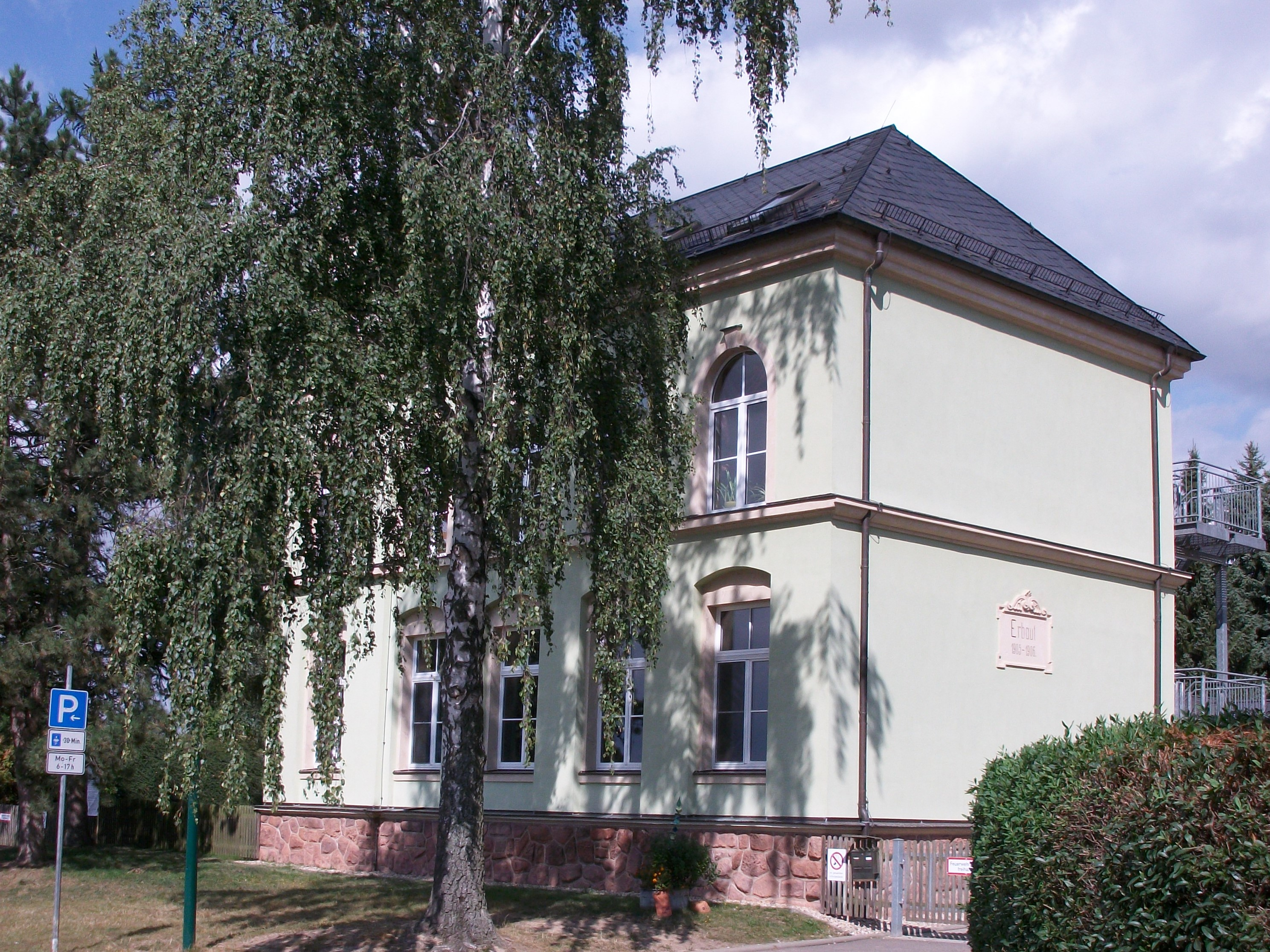 Evangelische Grundschule Seelitz